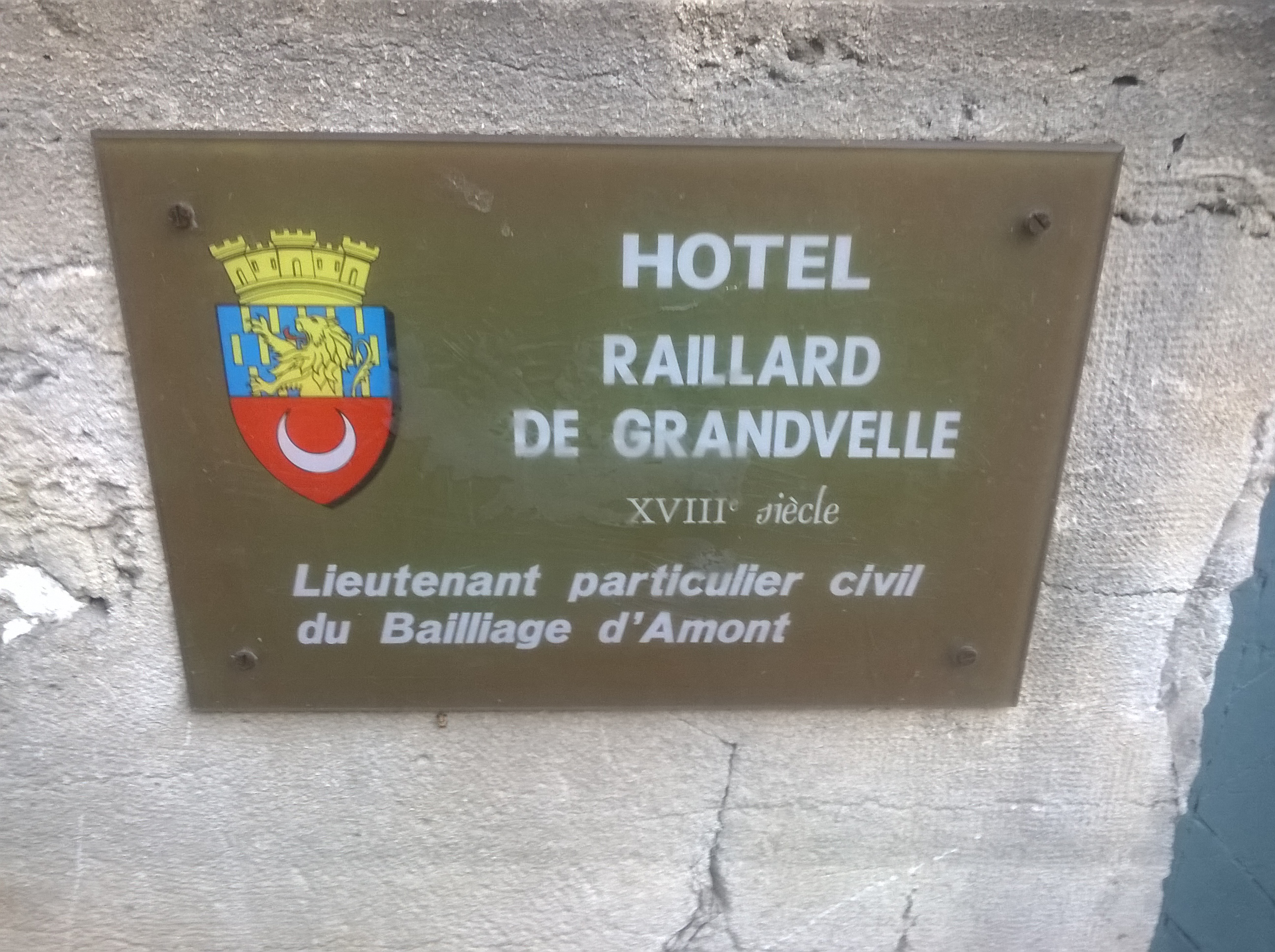 Hôtel Raillard de Grandvelle Plaque monument historique